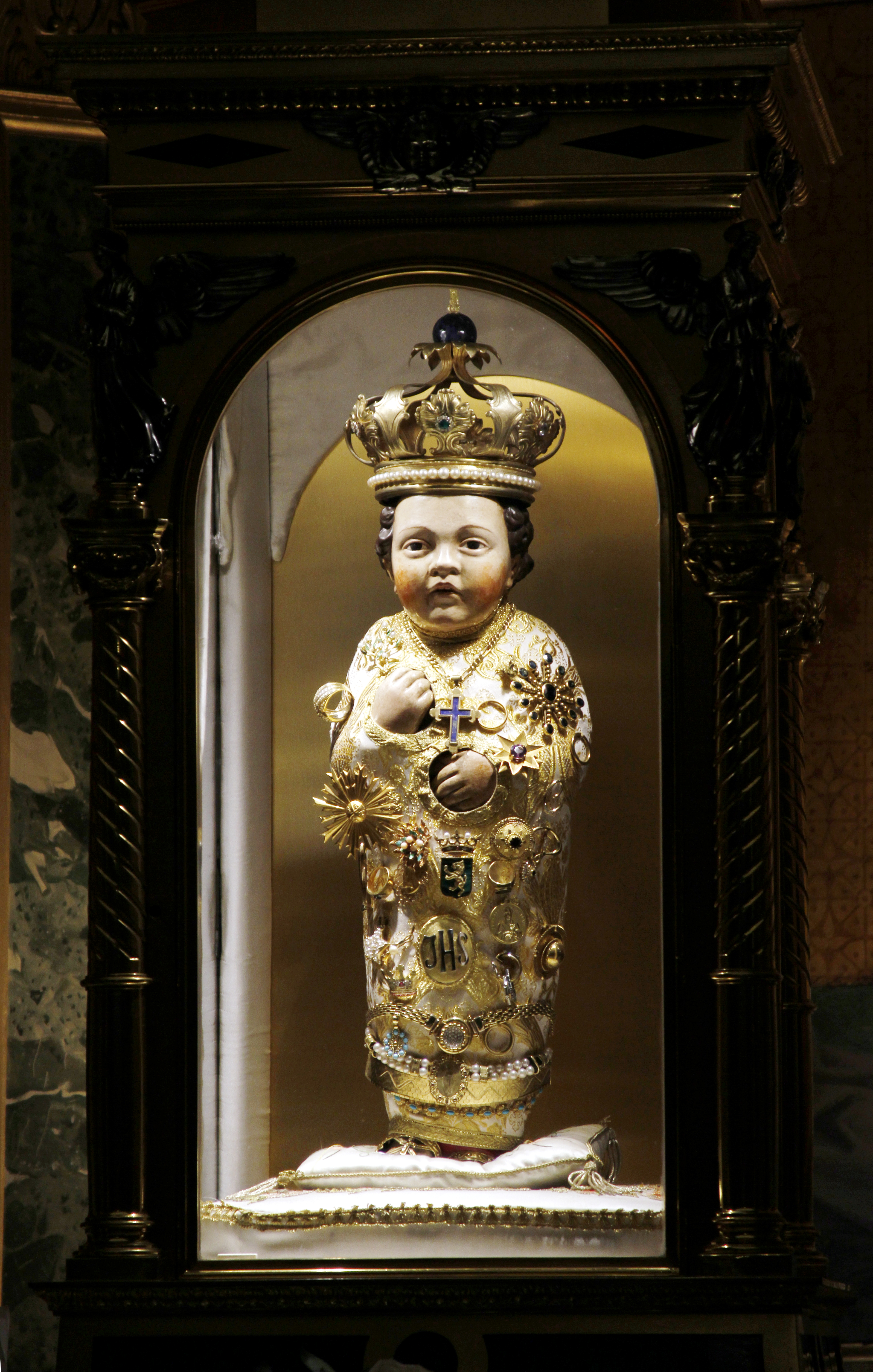 Santa Maria in Aracoeli - Rome